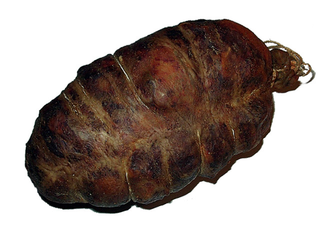 Botillo